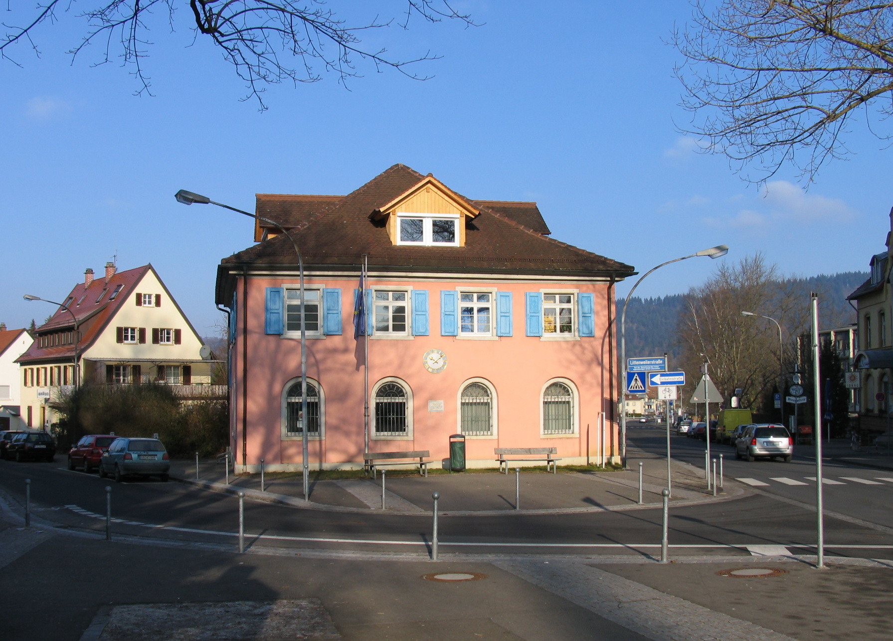 * Beschreibung: altes Schulhaus im Freiburger Stadtteil Littenweiler * Quelle: selbst aufgenommen * Fotograf: CrazyD, 31. Januar 2009 * Description: old school in Littenweiler * Source: photo was taken by my self * Photographer: CrazyD, 31 January 2008